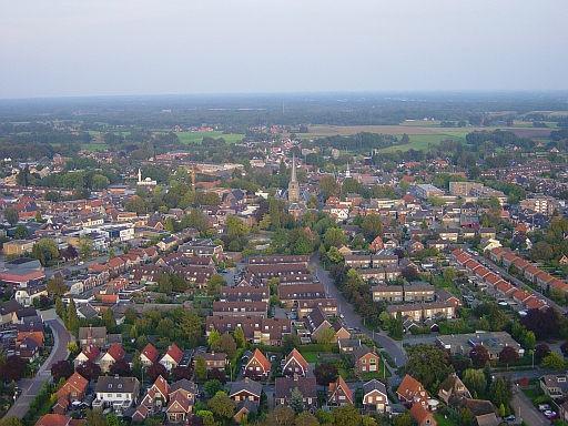 Foto gemaakt door Dennis Wissink